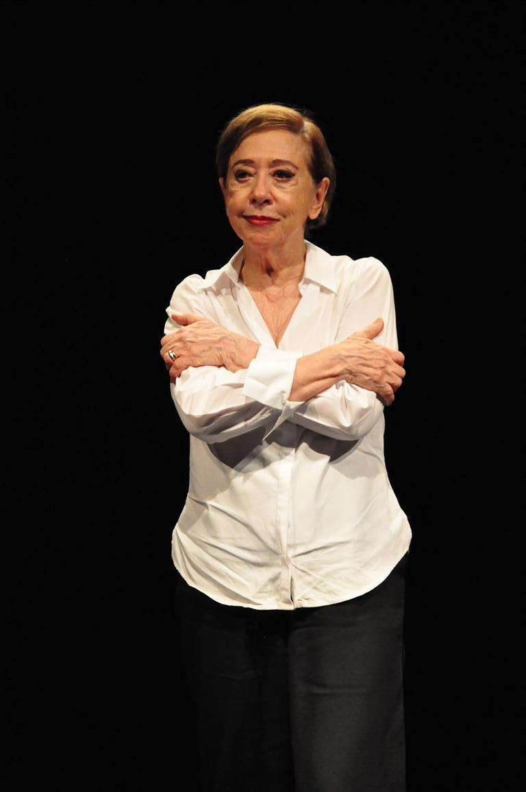 Circuito Cultural: Fernanda Montenegro em Viver sem tempos mortos.